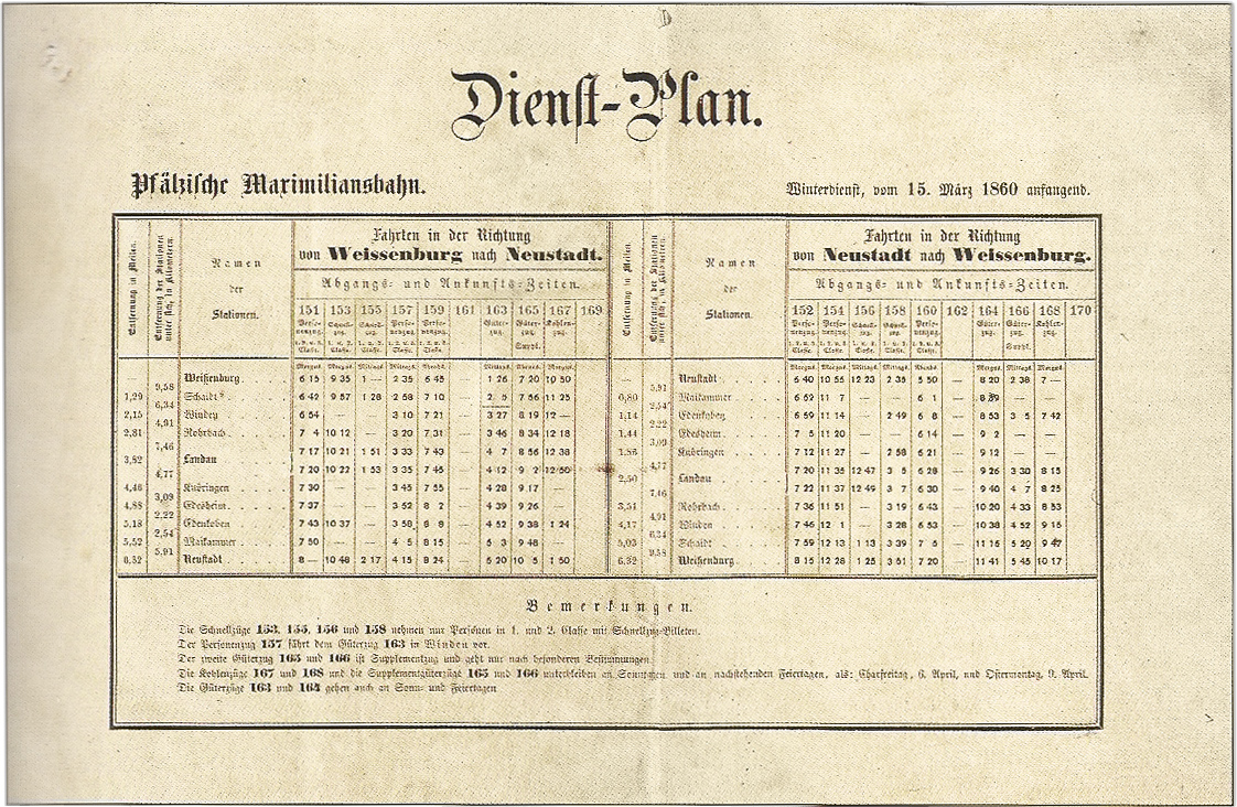 Dienstplan der Pfälzischen Maximiliansbahn von 1860